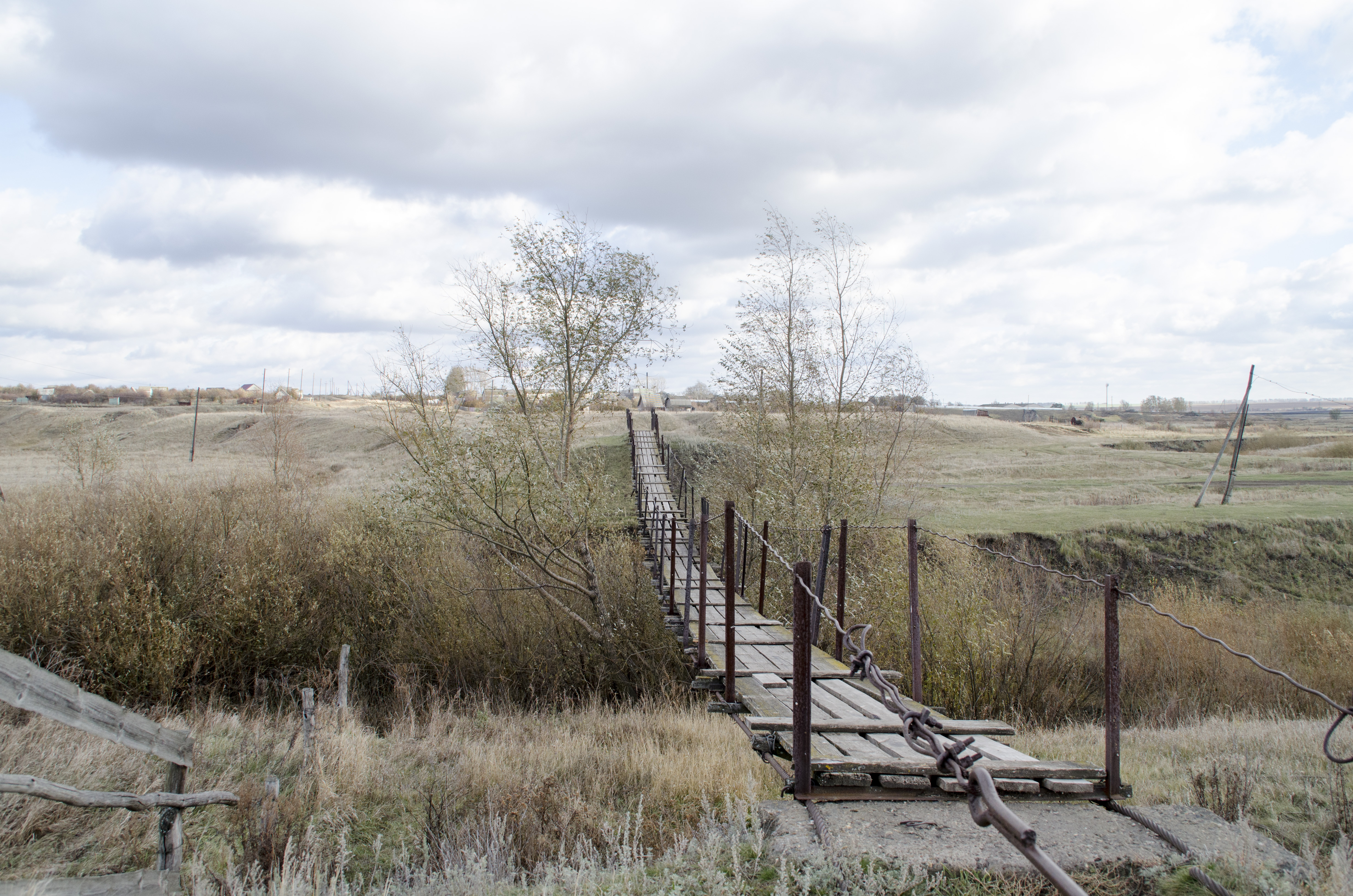 Мостик подвесной